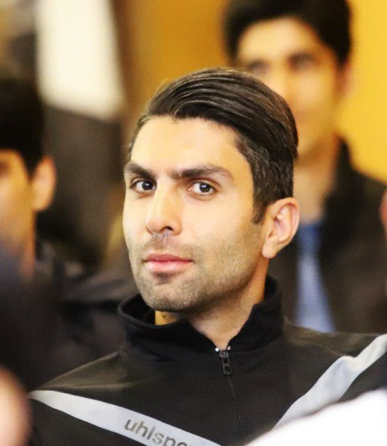 تصاویر مرحله دوم کلاس مربیگری B آسیا در تهران به مدرسی امیر حسین پیروانی با حضور ستارگان سابق فوتبال مثل تیموریان، جباری، حیدری،‌عمران‌زاده، بیک‌زاده و بنگر